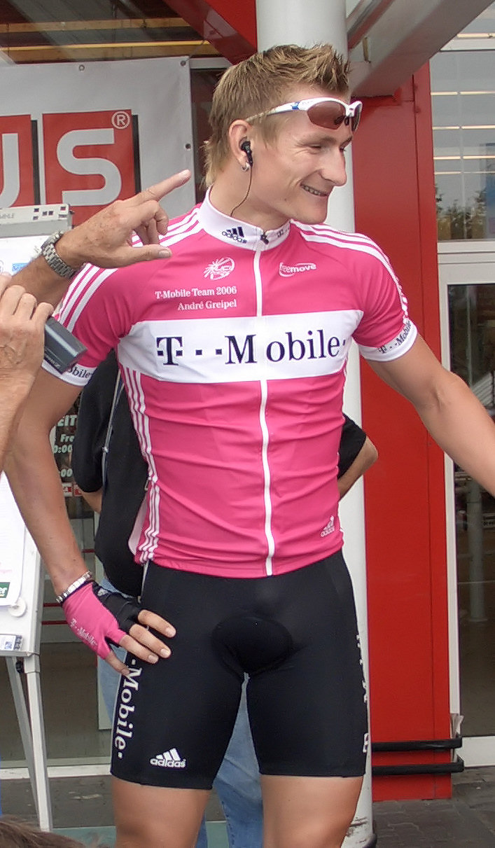 André Greipel at race in Germany